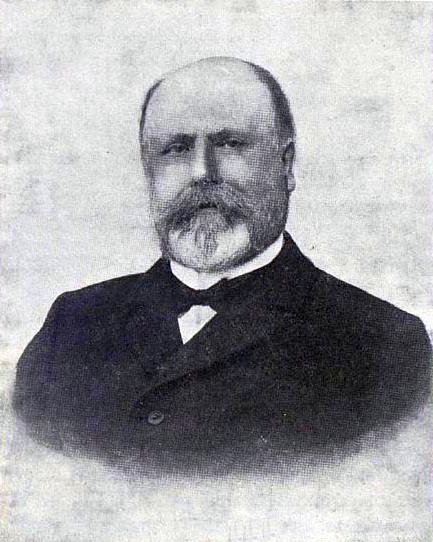 Le Professeur Auguste Guilhem, de la faculté de médecine de Toulouse, médecin chef honoraire des hospices de Toulouse (vice-président du Conseil Général de la Haute-Garonne).